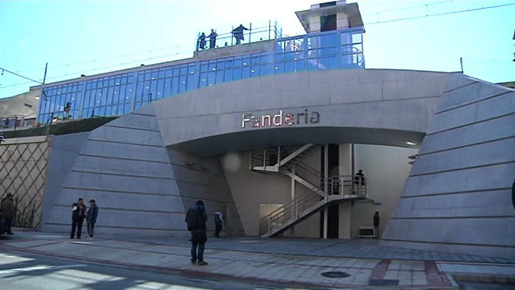 Euskotren Fanderia geltokia Topo Errenteria